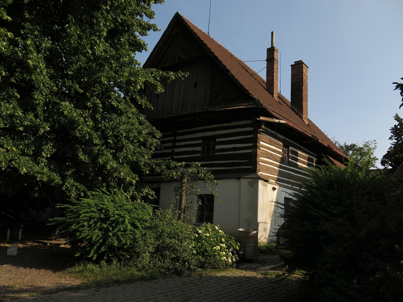 Usedlost čp. 8, Sudislav nad Orlicí 8, Sudislav nad Orlicí.